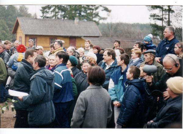 Uroczyste pożegnanie pociągu w Sokolem dnia 2 kwietnia.2000 roku. Ostatni raz przejeżdża pociąg przez Sokole, a jego mieszkańcy ze smutkiem żegnają. W uroczystościach uczestniczyły media: prasa centralna i regionalna, TVP Białystok i Polskie Radio Białystok. W dziennikach, tygodnikach i miesięcznikach ukazały się tytuły: Gazeta Wyborcza "Zubki: 17,26", Kurier Poranny "Zostały tylko szyny", Gazeta Współczesna "Pożegnanie z PKP", Super Express "Odcięli nas od świata", Kurier Poranny "Samochodowa samopomoc", Gazeta Współczesna "Sokole bez autobusów", Kurier Poranny "Skazani tylko na siebie?", Gazeta Michałowa i okolic "Sokole Białostockie: 17,46", Nowy Dziennik w Nowym Jorku (USA) "Wieś odcięta od świata", Gazeta Wyborcza "Sokole? Koniec świata!", Życie "Trzy kilometry do Europy", Życie na Gorąco "Ludzie odcięci od świata", Naj "Ostatni pociąg już dawno odjechał", Przegląd Prawosławny "15,40 do Zubek", Rzeczpospolita "A to Polska właśnie"